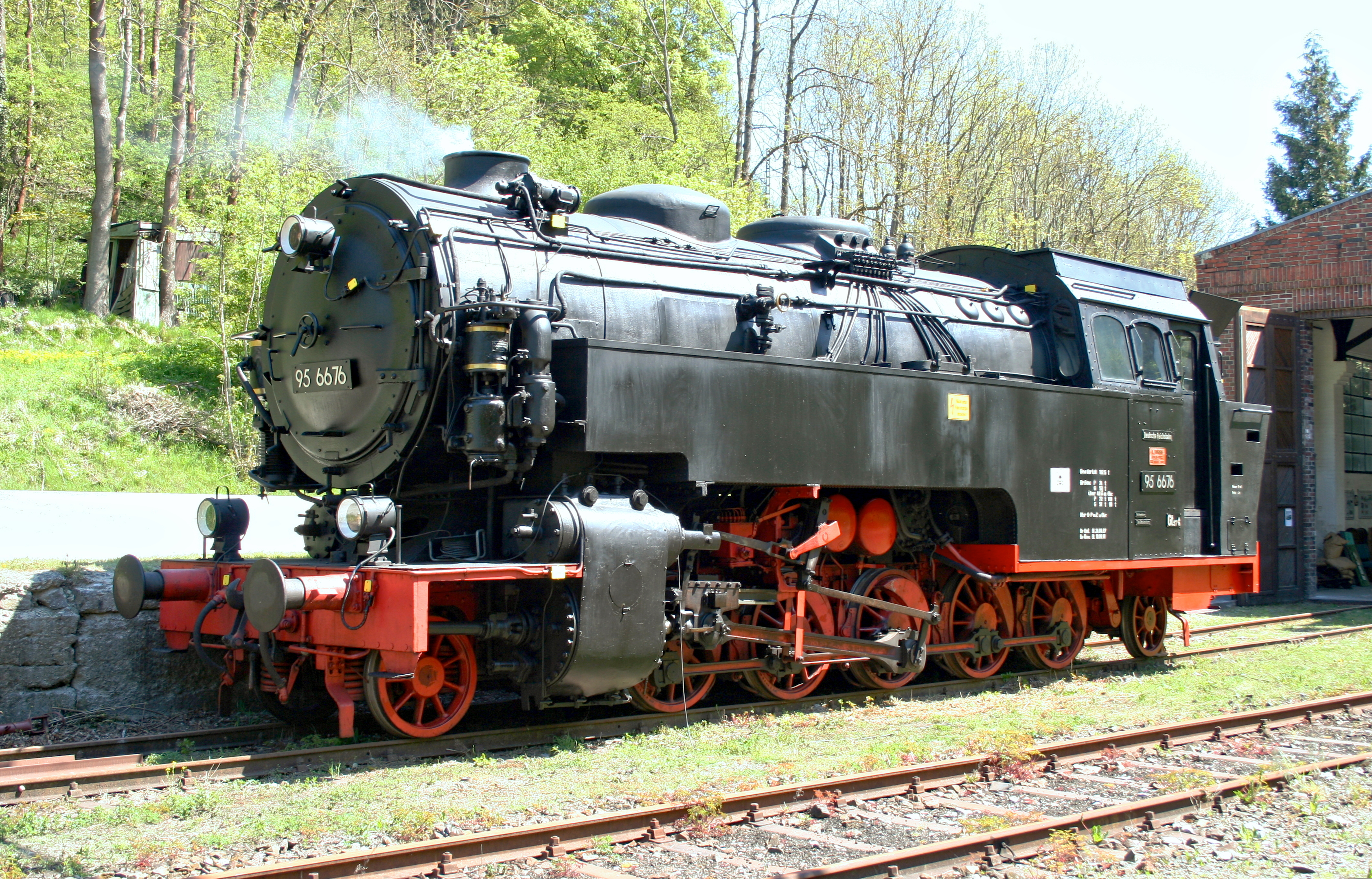 Dampflokomotive 95 6676 der DR (ex HBE "Mammut") 1´E 1´h2t Borsig 10353/1919 in Rübeland am 11.Mai 2005